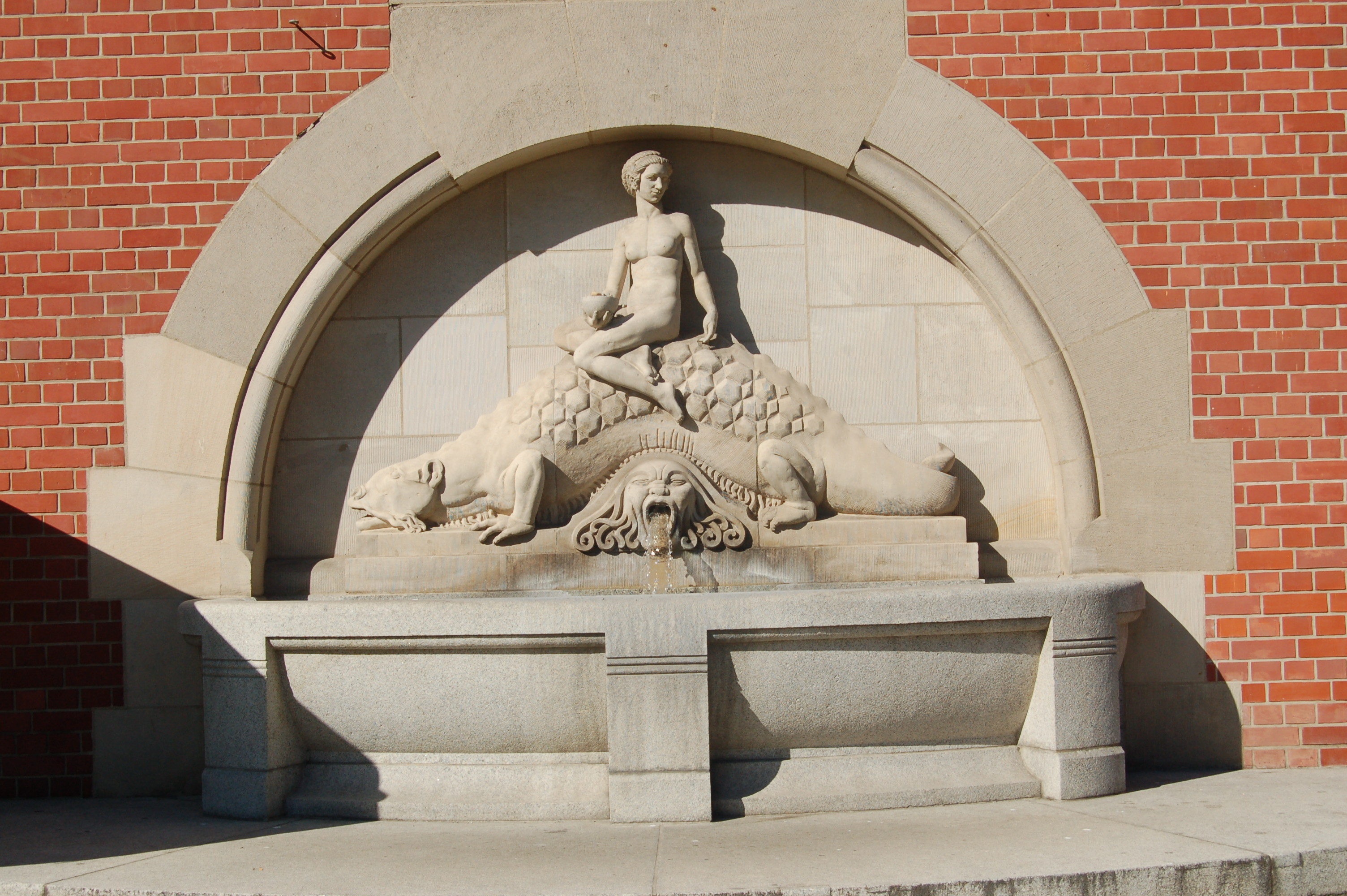 Brunnen am Wasserturm "Kleinburg", 1907, Breslau, Niederschlesien, Polen